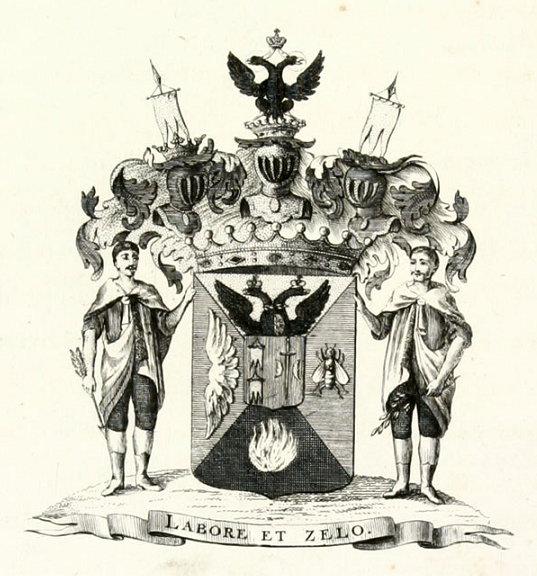 Герб рода графа Безбородко